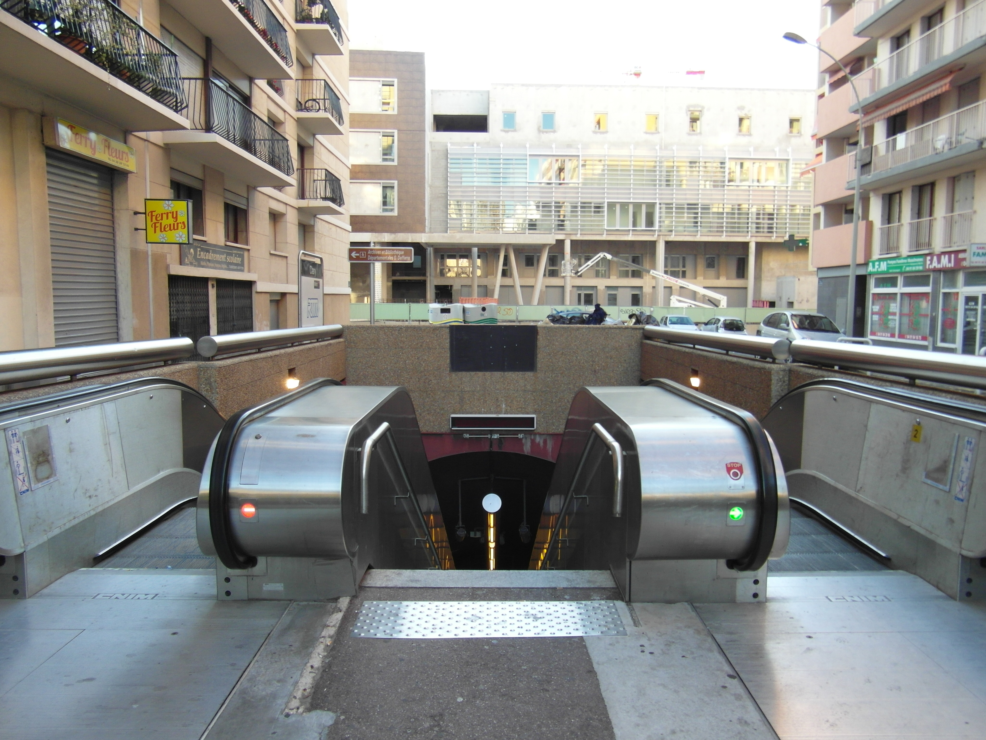 Marseille - Métro - Desirée Clary